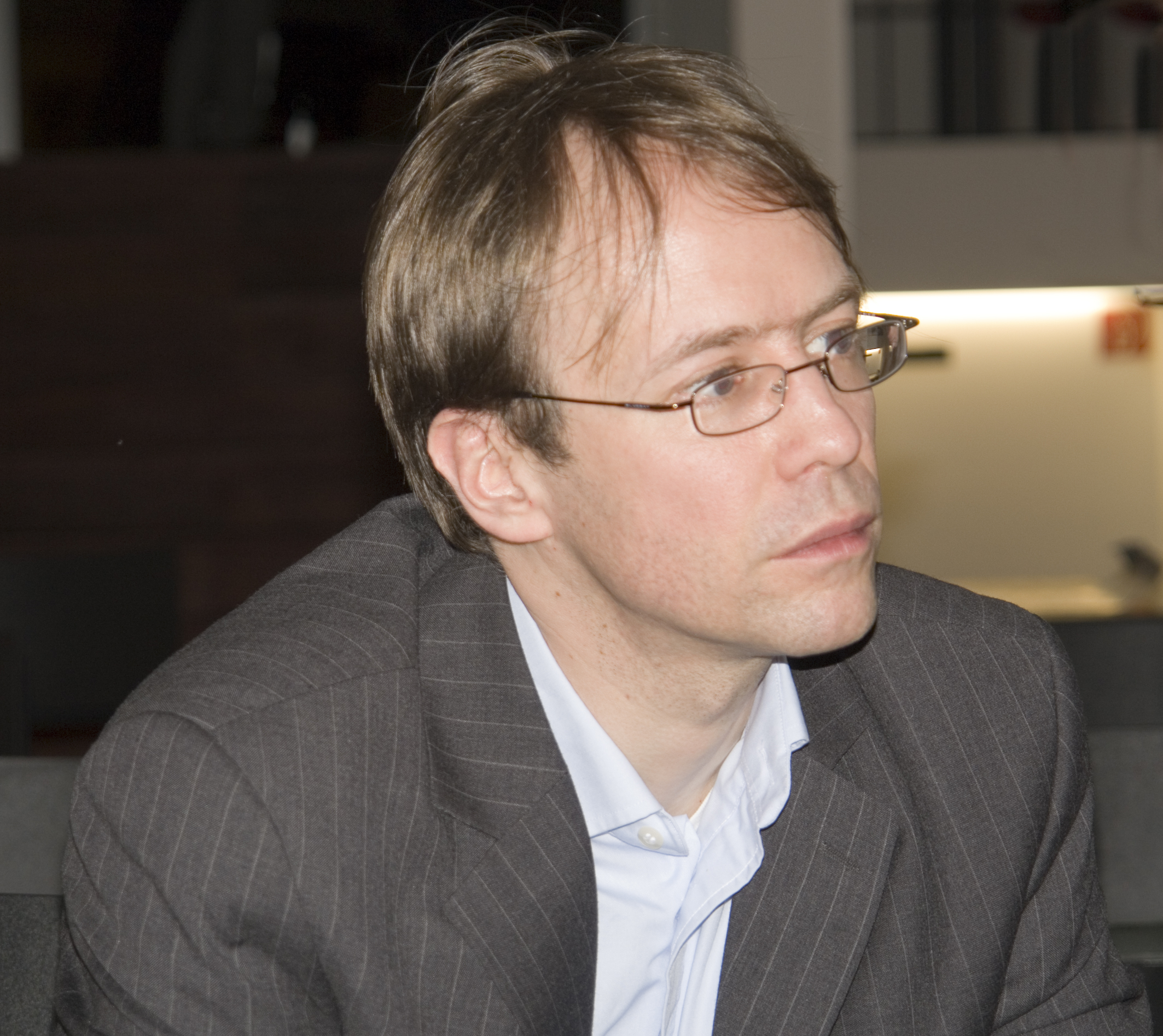 Joachim Helfer, deutscher Schriftsteller (german author)